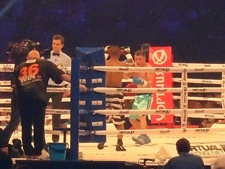 Pro debut Denis Berinchyk vs. Tarik Madni Про дебют Дениса Беринчика (бой с Тариком Мадни)